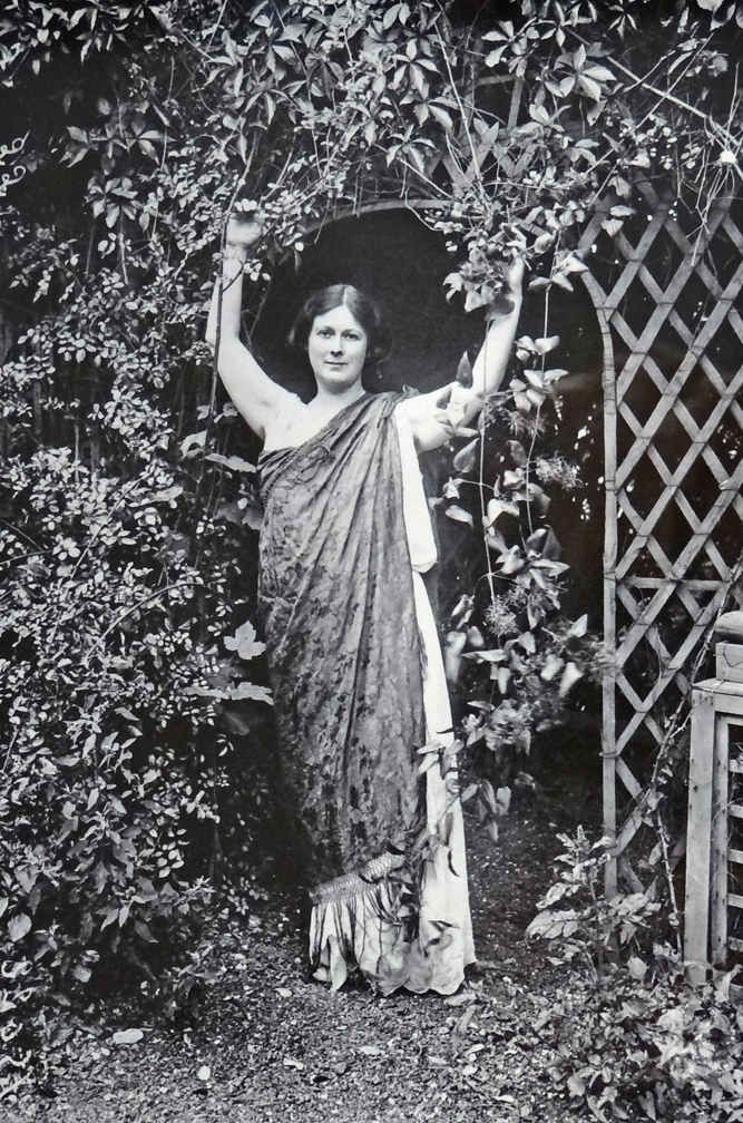 Agence de presse Meurisse. Isadora Duncan dans son pavillon de Bellevue 1919 Photographie personnelle d'un tirage N/B réalisé en 2013 à partir de l'original Tirage présenté dans l'exposition Eileen Gray car la célèbre danseuse Isadora Duncan a été une cliente de la galerie Jean Désert ouverte par Eileen Gray à Paris en 1922. Bibliothèque nationale de France L'Ecole de danse d'Isadora Duncan (1877-1927) se trouvait jusqu'au début de la Grande Guerre dans le grand hôtel de Bellevue acheté en 1913 par son compagnon Paris Singer, un des héritiers de la société du même nom et qu'il lui avait offert pour lui permettre de transmettre son art. Réquisitionné par l'armée durant la guerre pour y soigner les soldats blessés, le bâtiment a été occupé par la suite par l'office des inventions puis, à partir de 1939 et jusqu'à aujourd'hui, par des laboratoires du CNRS. Article de Wikipedia sur Isadora Duncan